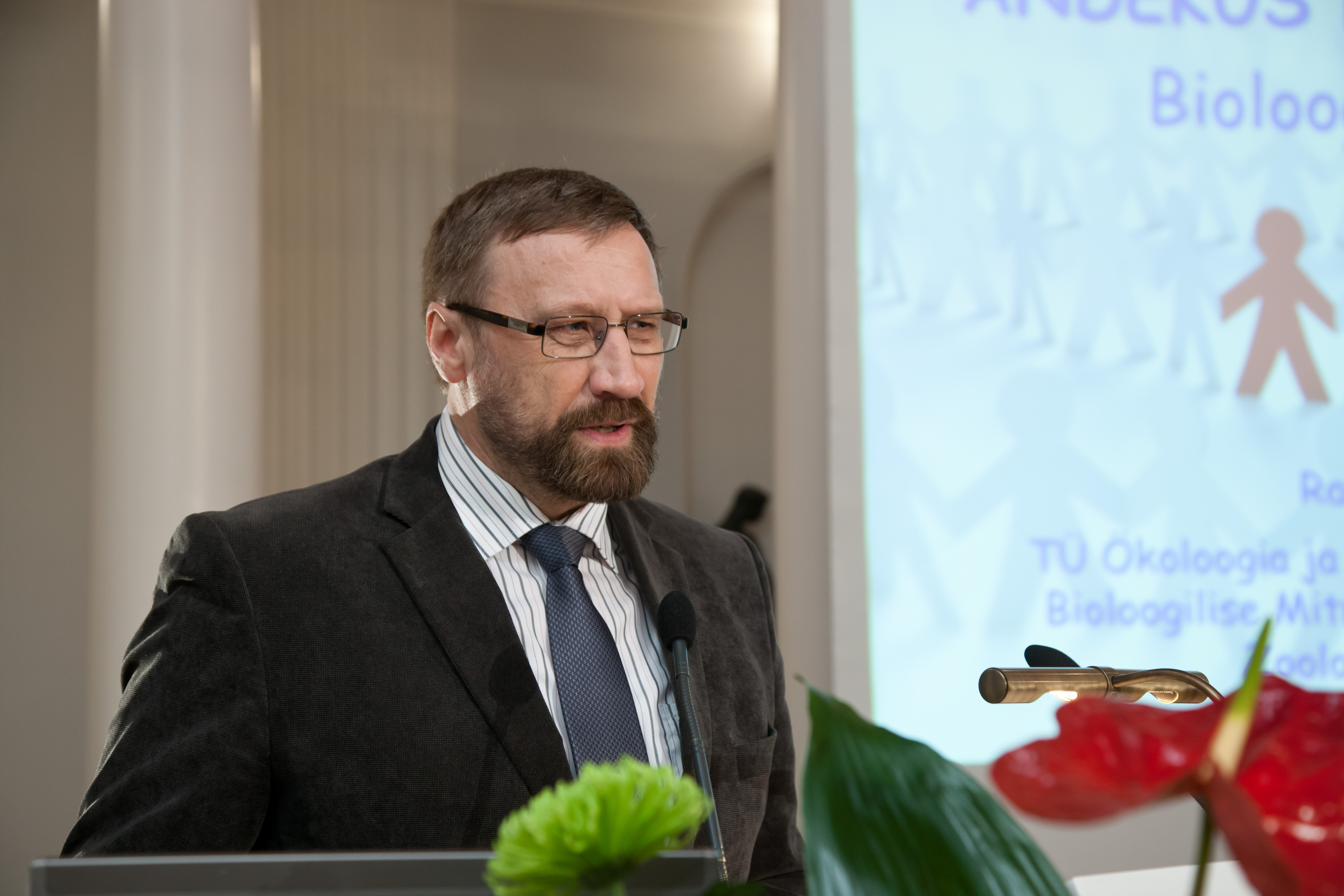 Konverents "Andekusest - nähtavast ja peidetust" Tartu Ülikooli aulas 6. jaanuaril 2012. Pildil TÜ loomaökoloogia professor Raivo Mänd esinemas ettekandega " Andekus kontekstis, bioloogi pilguga".